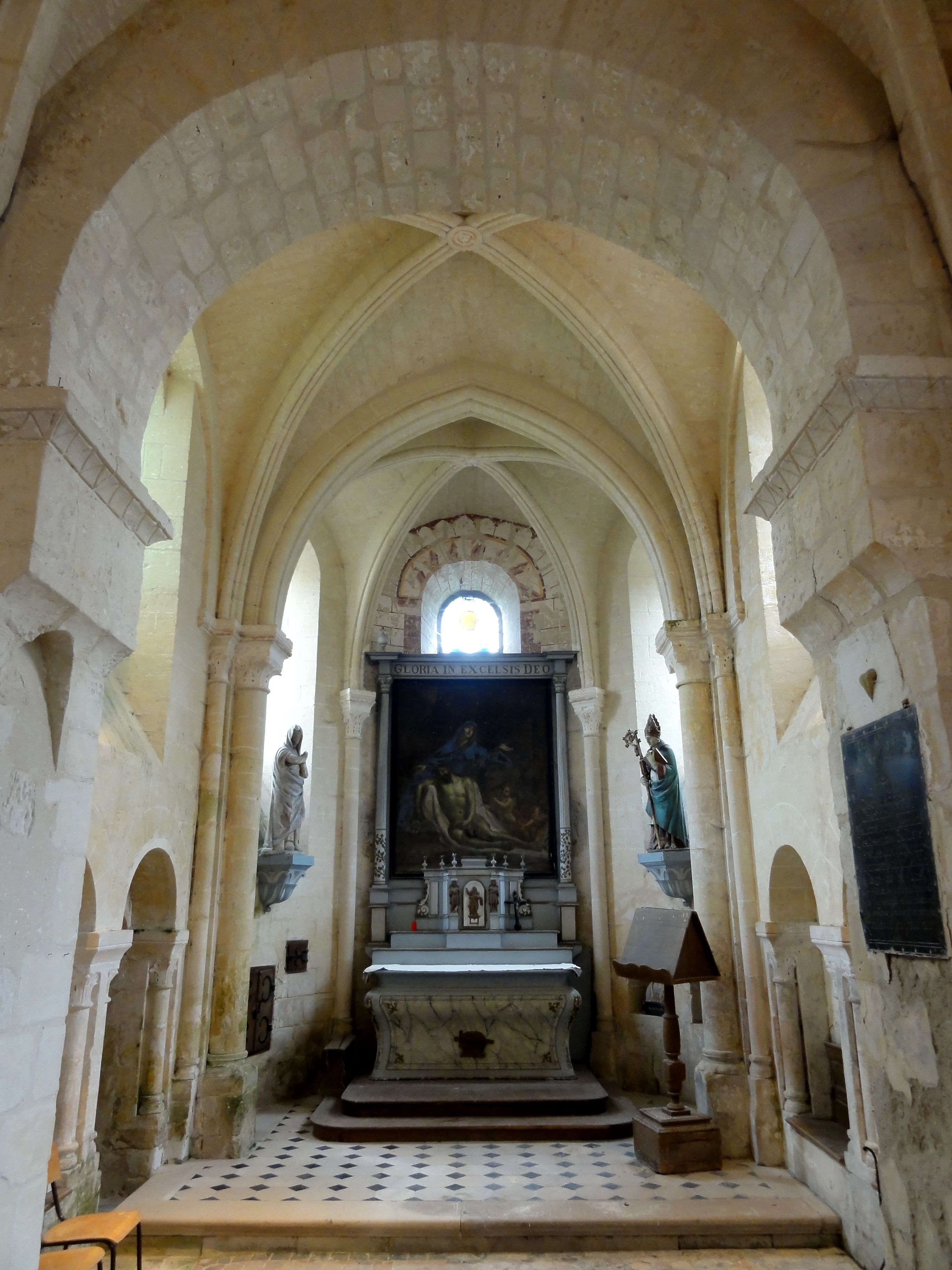 Base du clocher, arc triomphal.